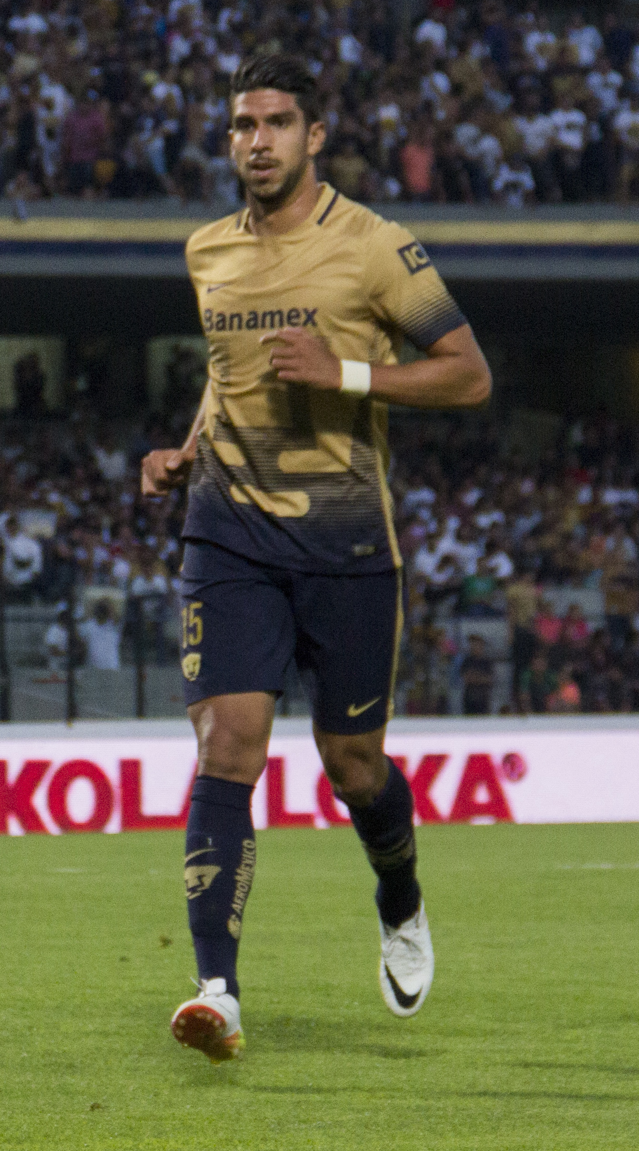 Pumas vs León